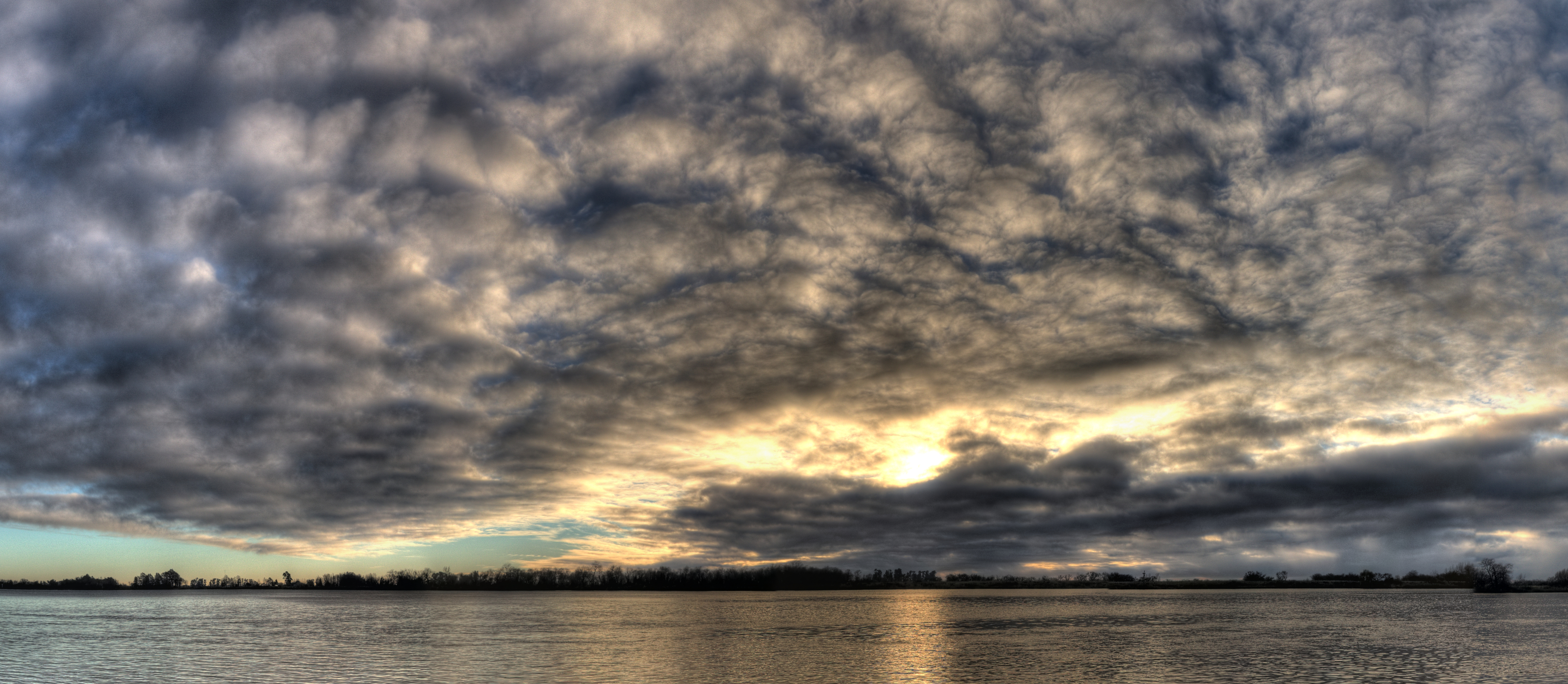 Parana River Panorama